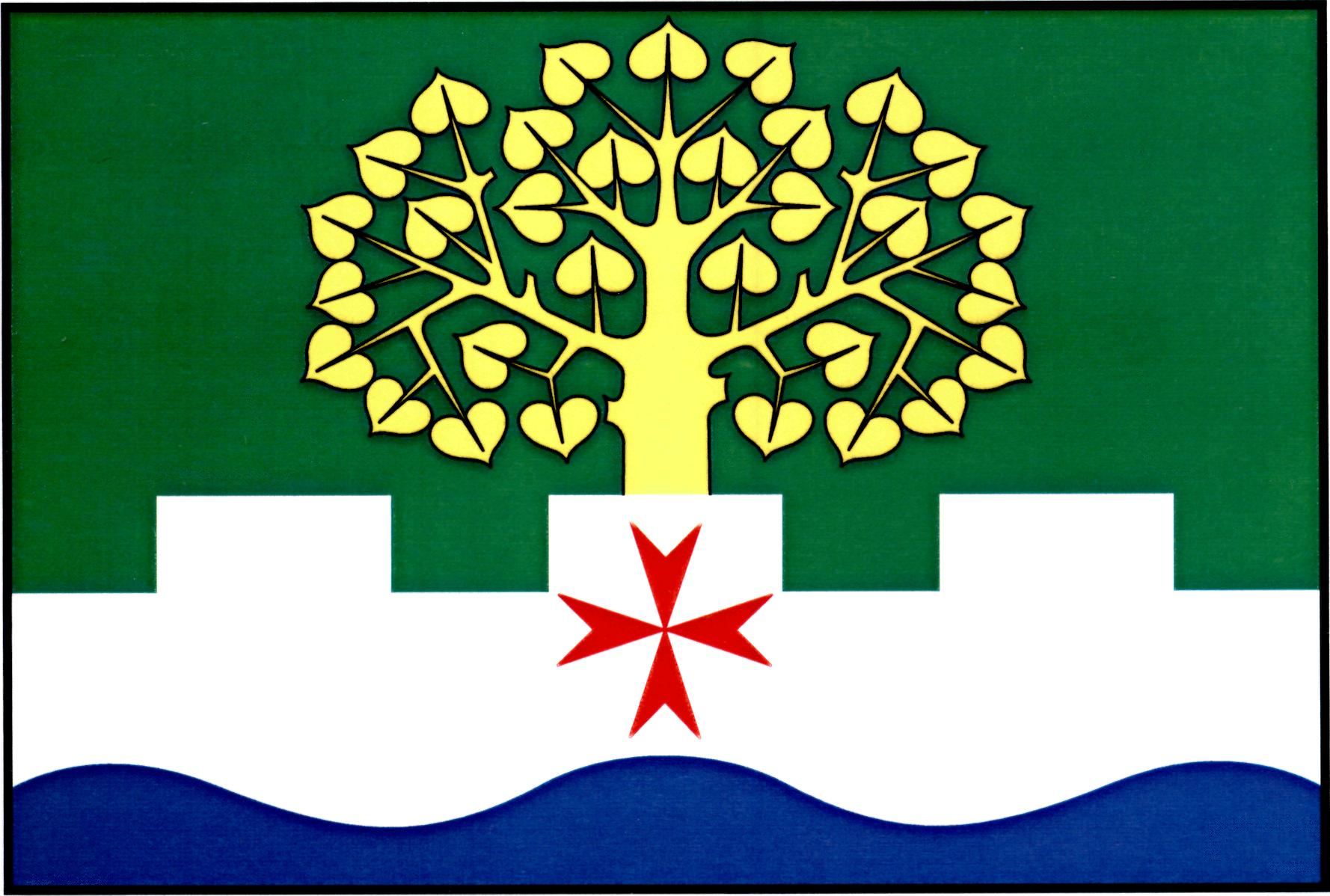 Vlajka obce Loukovec